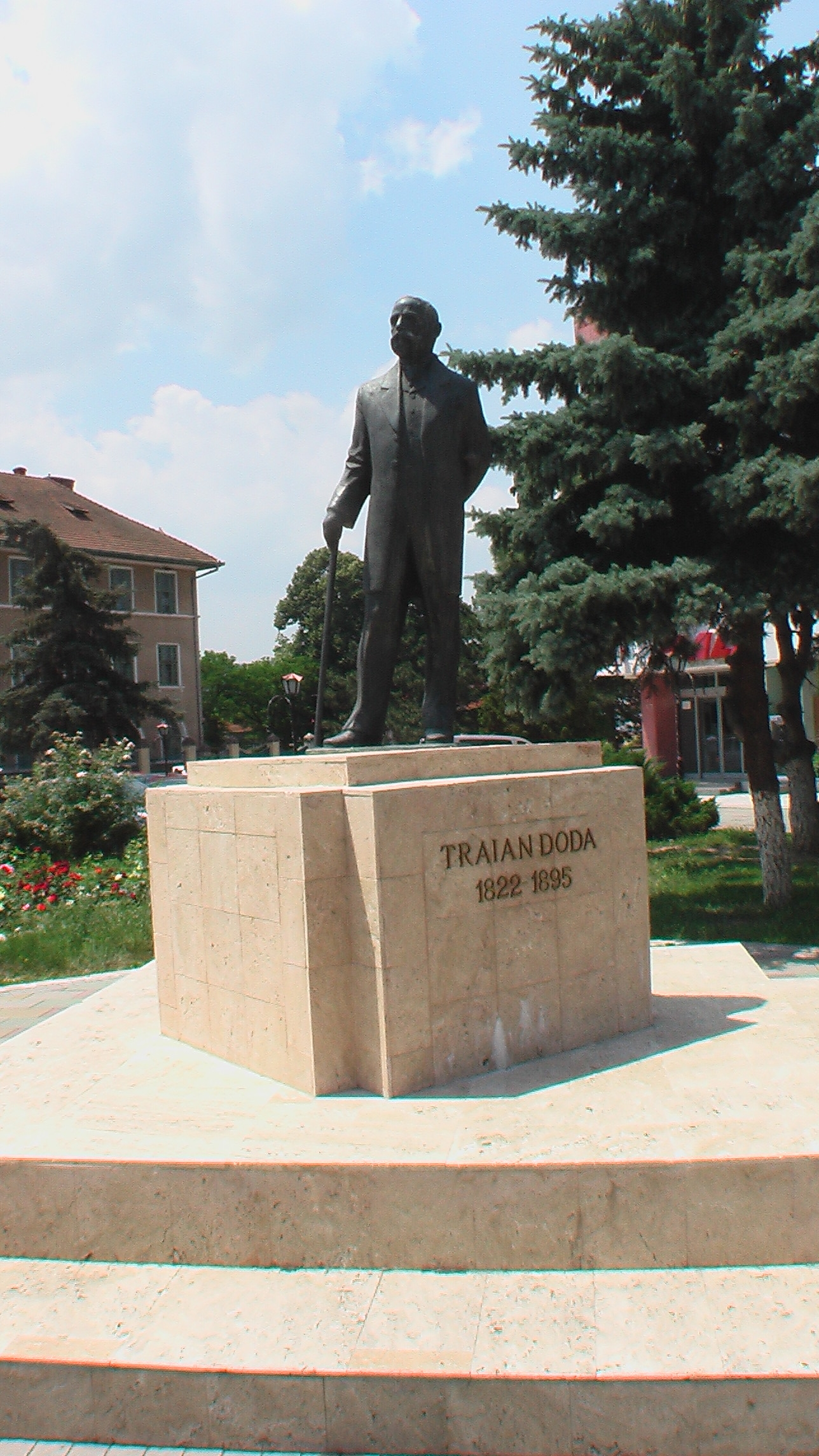 CaransebesTraianDoda